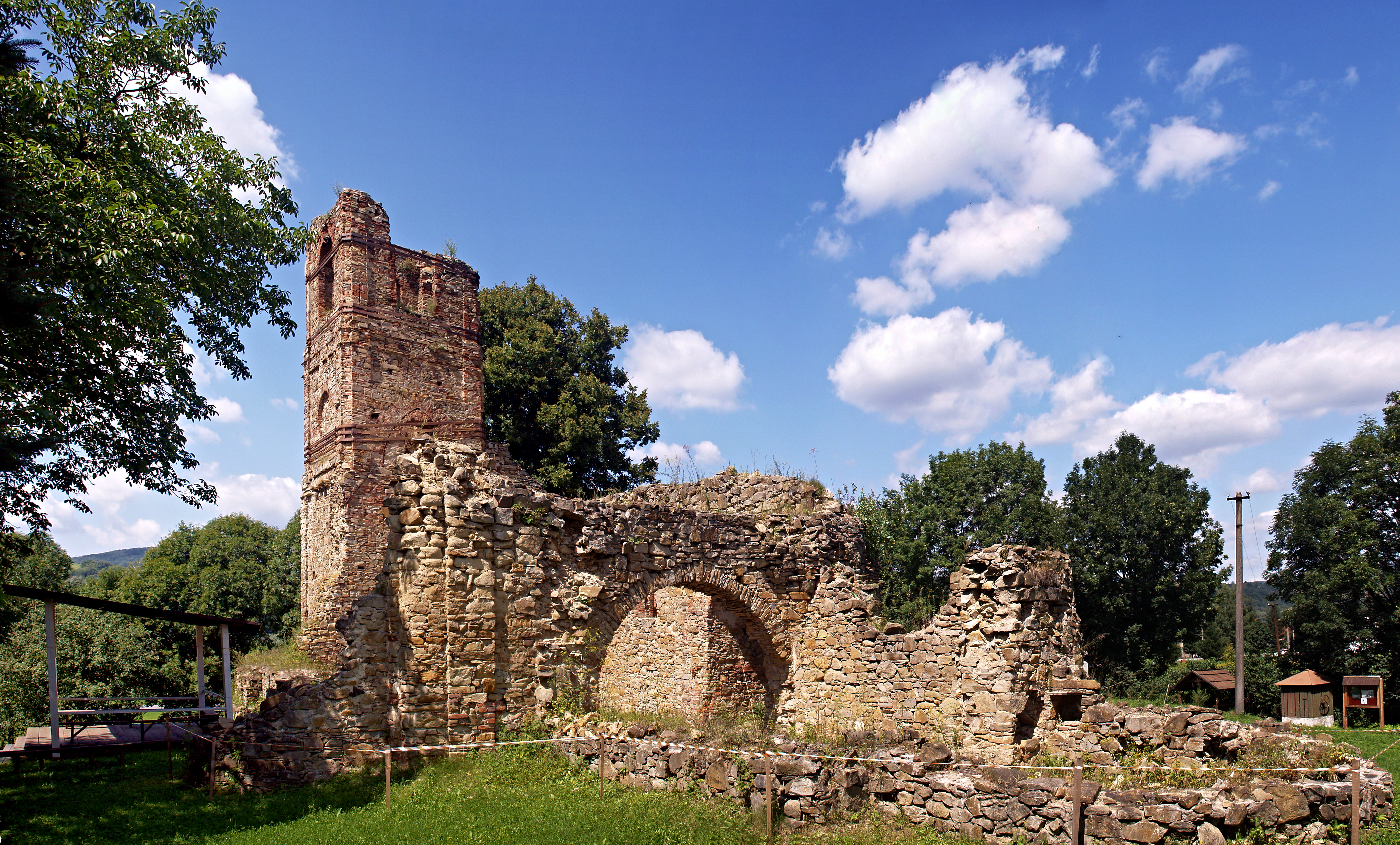 Krásny Brod, Prešov (Slovaquie) - Les ruines du monastère basilien de la Descente de l'Esprit saint.